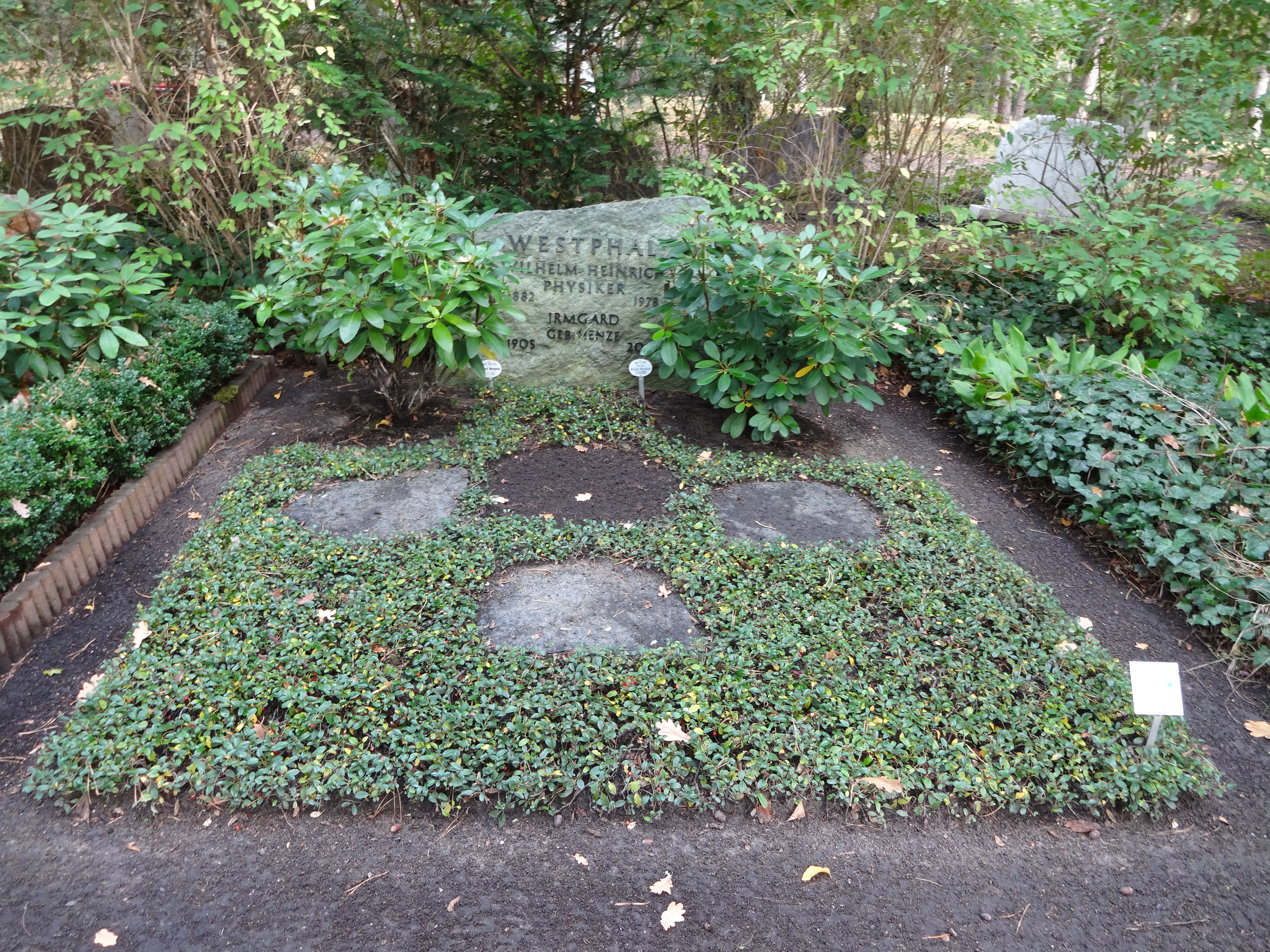 Grab von Wilhelm Westphal auf dem Waldfriedhof Zehlendorf